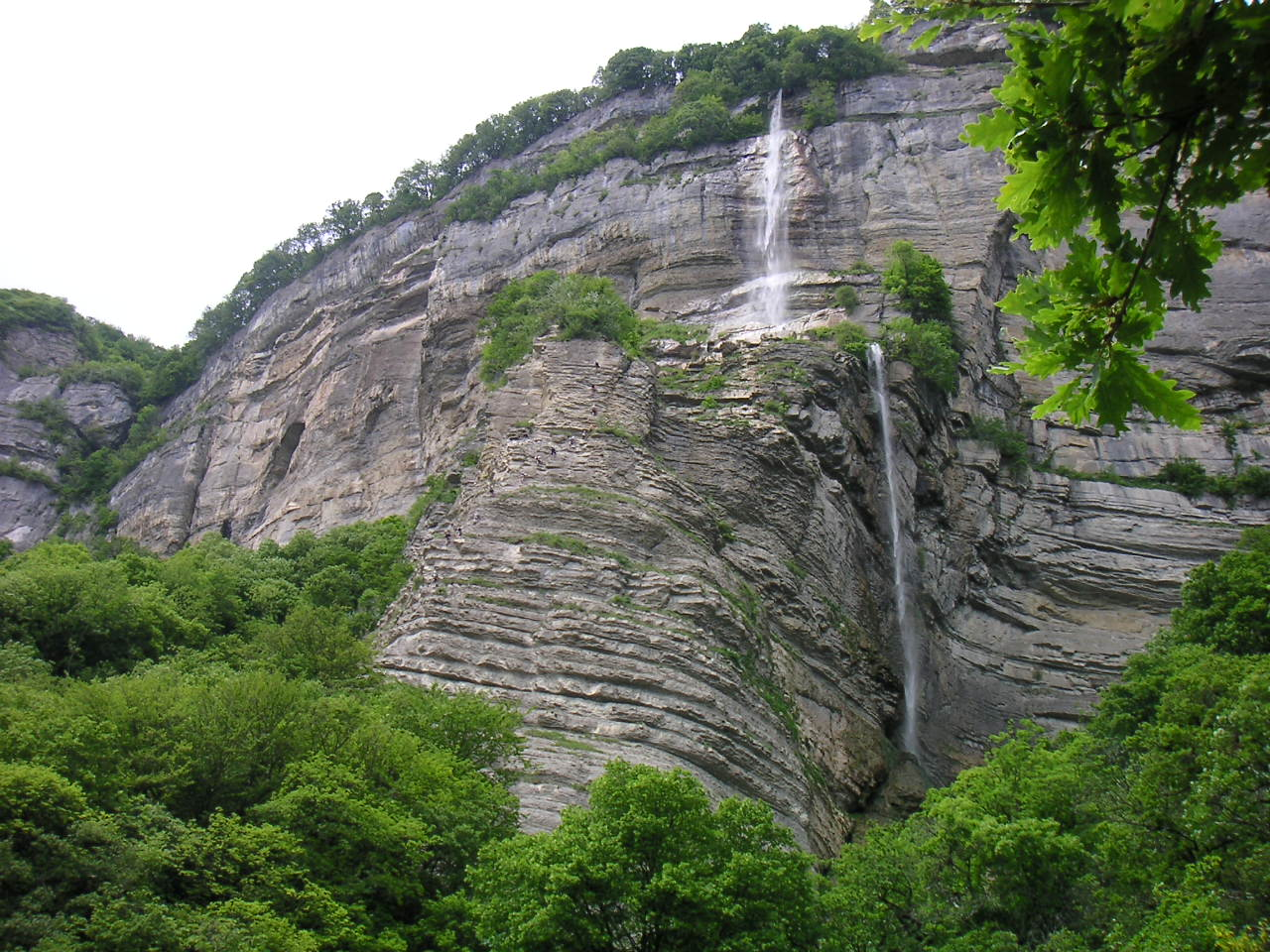 Cascade de l'Oule de Crolles near Saint-Hilaire du Touvet (38 - Isère). Prise de vue depuis le sentier du Pal de fer. - Via-ferrata (partie du pillier du belvédère)[1].